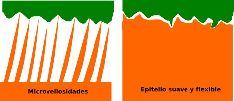 Ilustración de dos tipos de almohadillas adhesivas.